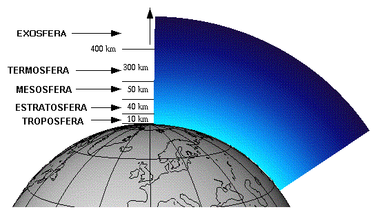 diagrama mostrando as camadas da atmosfera terrestre